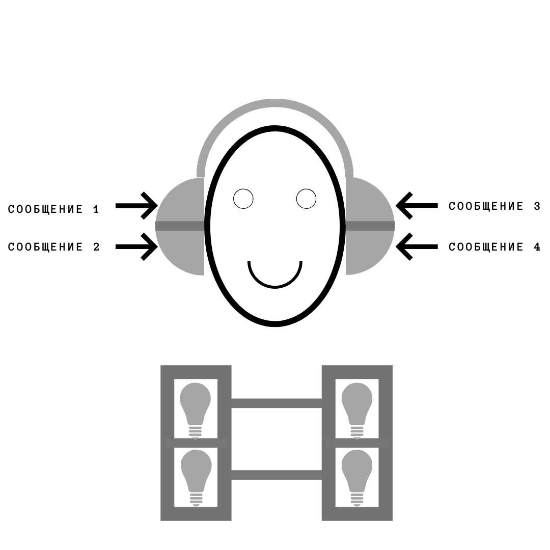 Схематическое изображение эсперимента с эхоической памятью Н.Морея